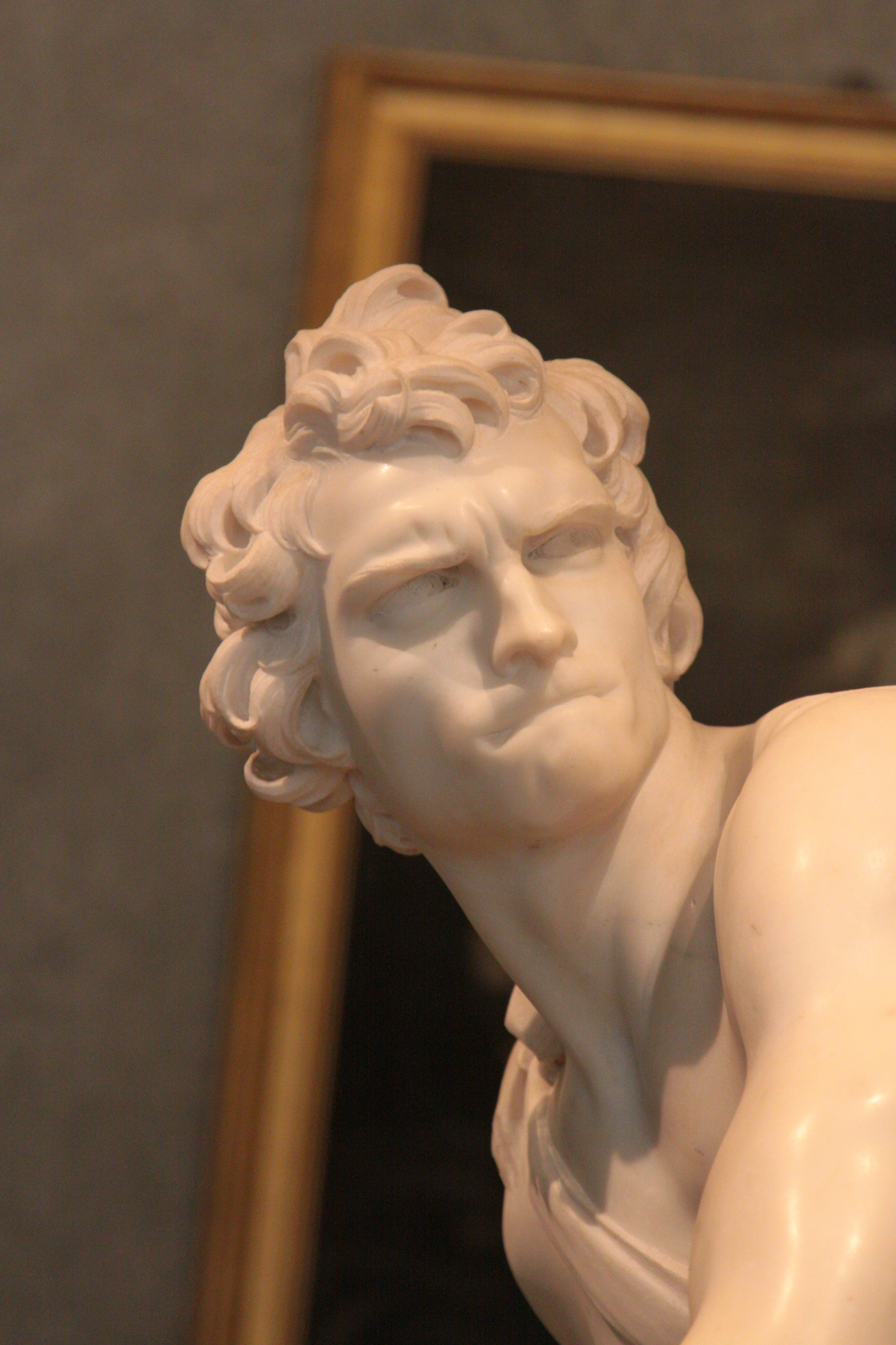 Джованни Лоренцо Бернини. Давид.